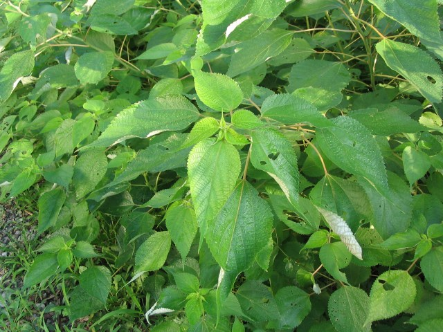 Boehmeria nivea Original description: 撮影者:ja:利用者:sphl 撮影日:2005年9月1日 撮影地:ja:町田市